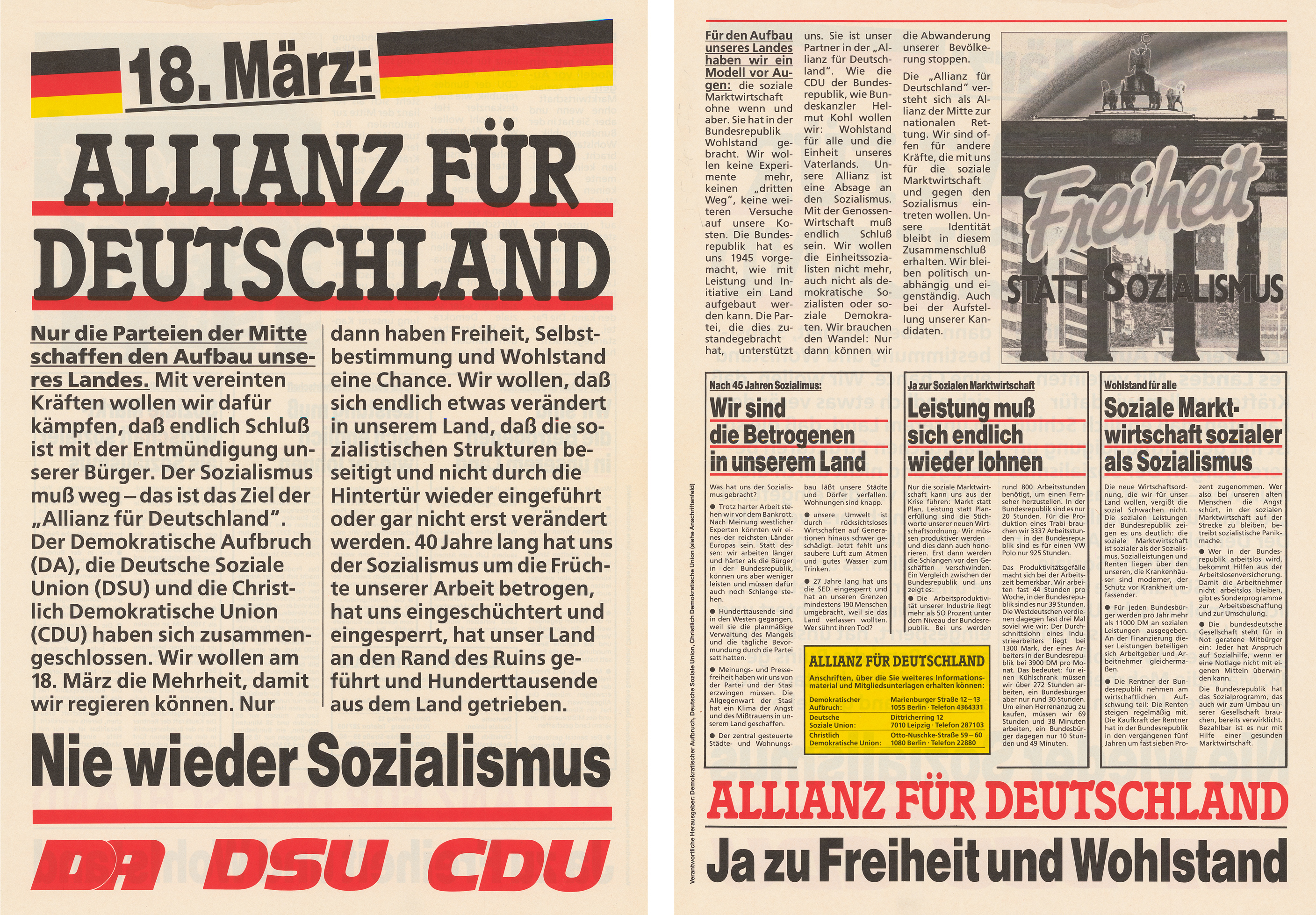 18. März: Allianz für Deutschland Nur die Parteien der Mitte schaffen den Aufbau unseres Landes... Nie wieder Sozialismus DA DSU CDU ...Abbildung:NationalfarbenKommentar:Beidseitig bedruckt Plakatart:Textplakat AllgemeinAuftraggeber:Verantw.: DA, DSU, CDUObjekt-Signatur:10-024 : 5011Bestand:Plakate aus der SBZ/DDR (10-024)GliederungBestand10-18:Plakate aus der SBZ/DDR (10-024) » Wahl zur Volkskammer am 18.3.1990 » Allianz für DeutschlandLizenz:KAS/ACDP 10-024 : 5011 CC-BY-SA 3.0 DE